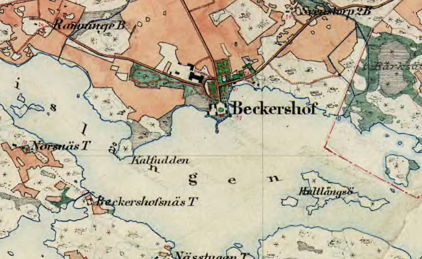 Beckershof på Häradsekonomiska kartan